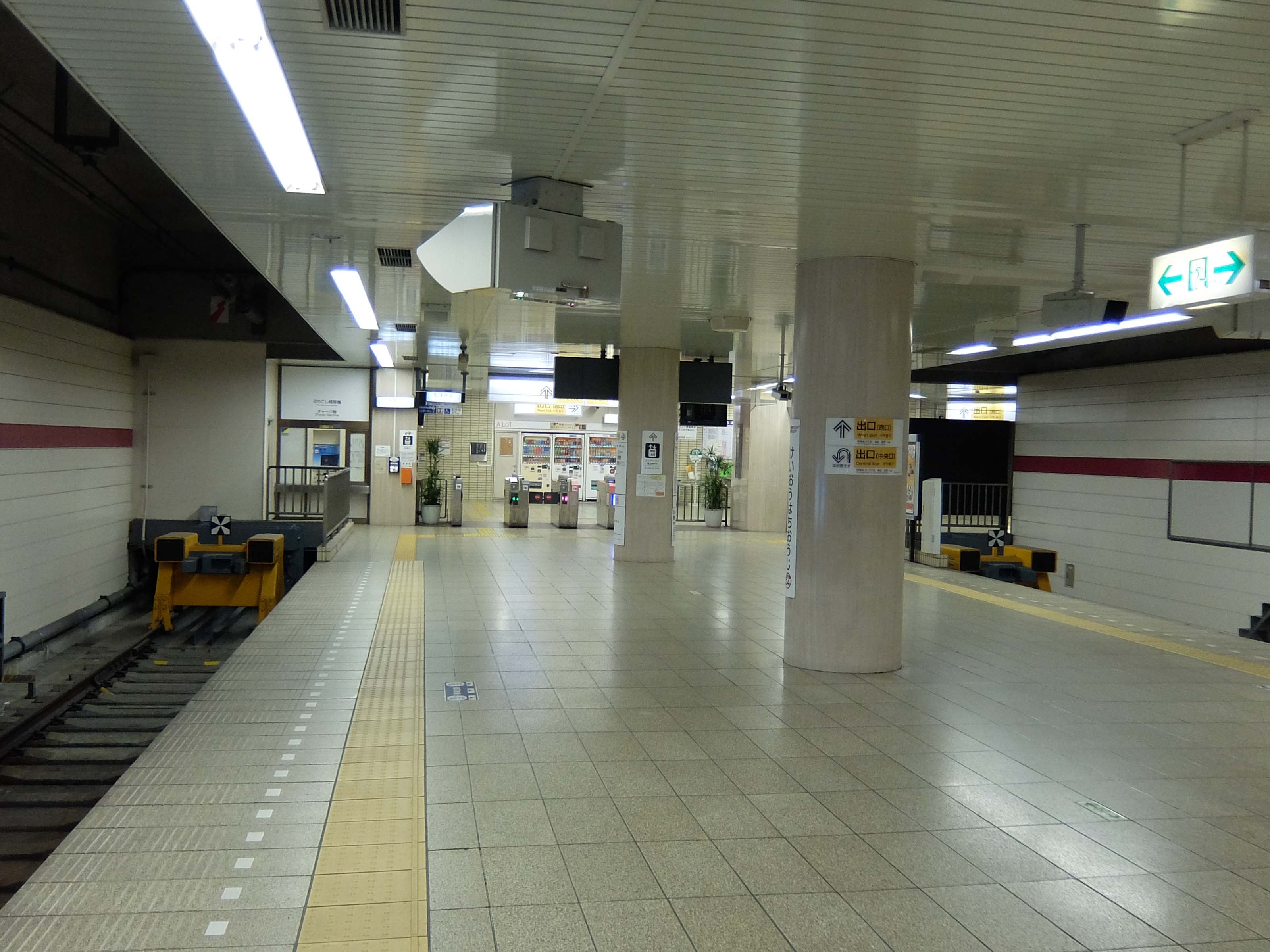 京王八王子駅 ホームより改札を望む